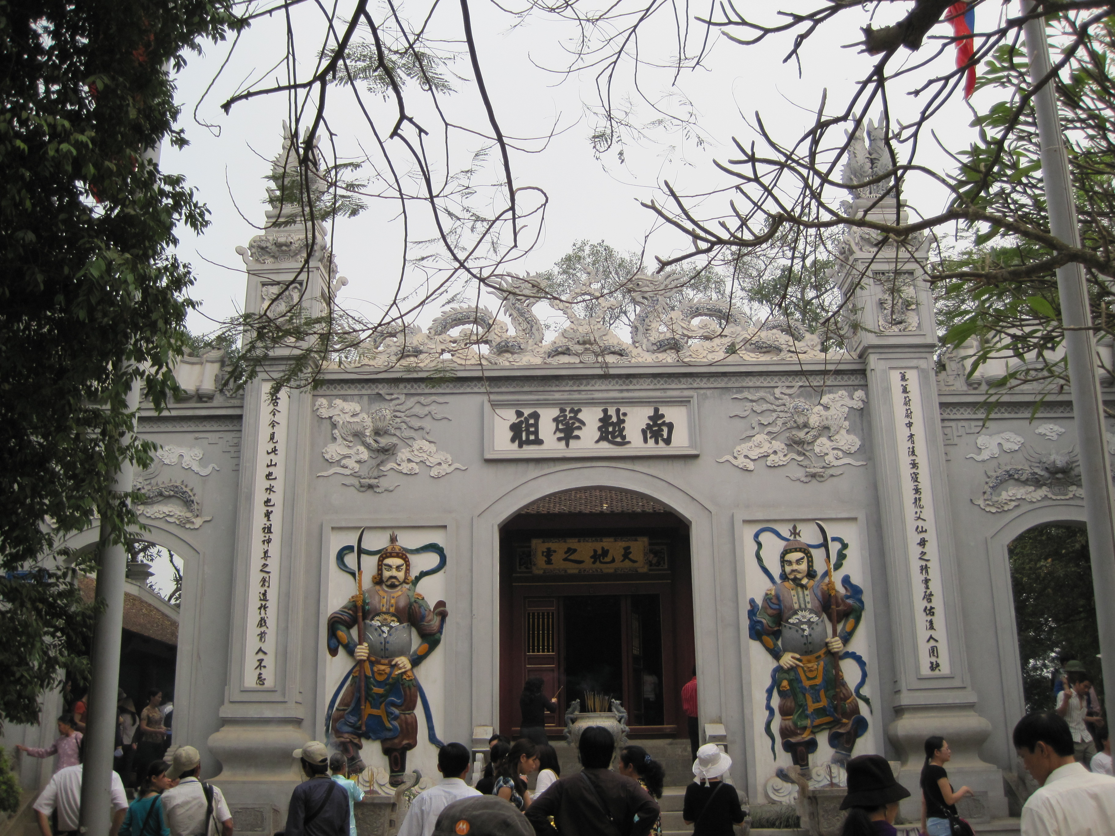 Đền Thượng trong quần thể di tích đền Hùng, Việt Trì, Phú Thọ. Ảnh do Khương Việt Hà chụp và hiến cho Wikipedia.